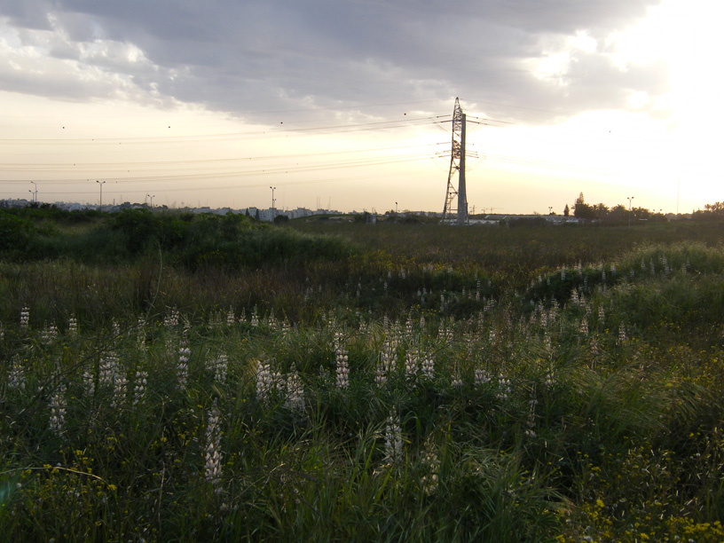 צולם ע"י עדו ארמיאץ בשדות באר יעקב